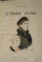 Couverture de "L'Abbé Jules", roman d'Octave Mirbeau (1848-1917), illustré par Hermann-Paul (1864-1940). Éditions Arthème Fayard, collection « Modern Bibliothèque », 1904.